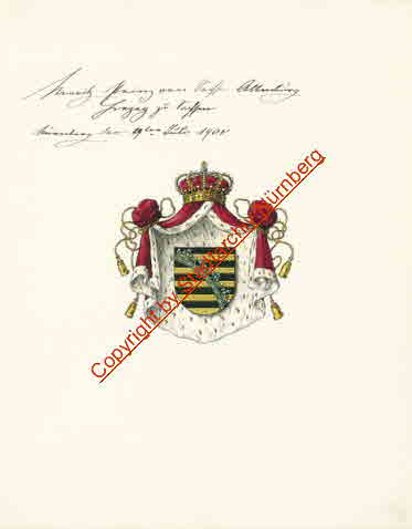 Copyfraud durch Stadtarchiv Nürnberg - Das Bild wird als Anschauungsmaterial für Copyfraud benötigt, nicht aufgrund des Inhalts